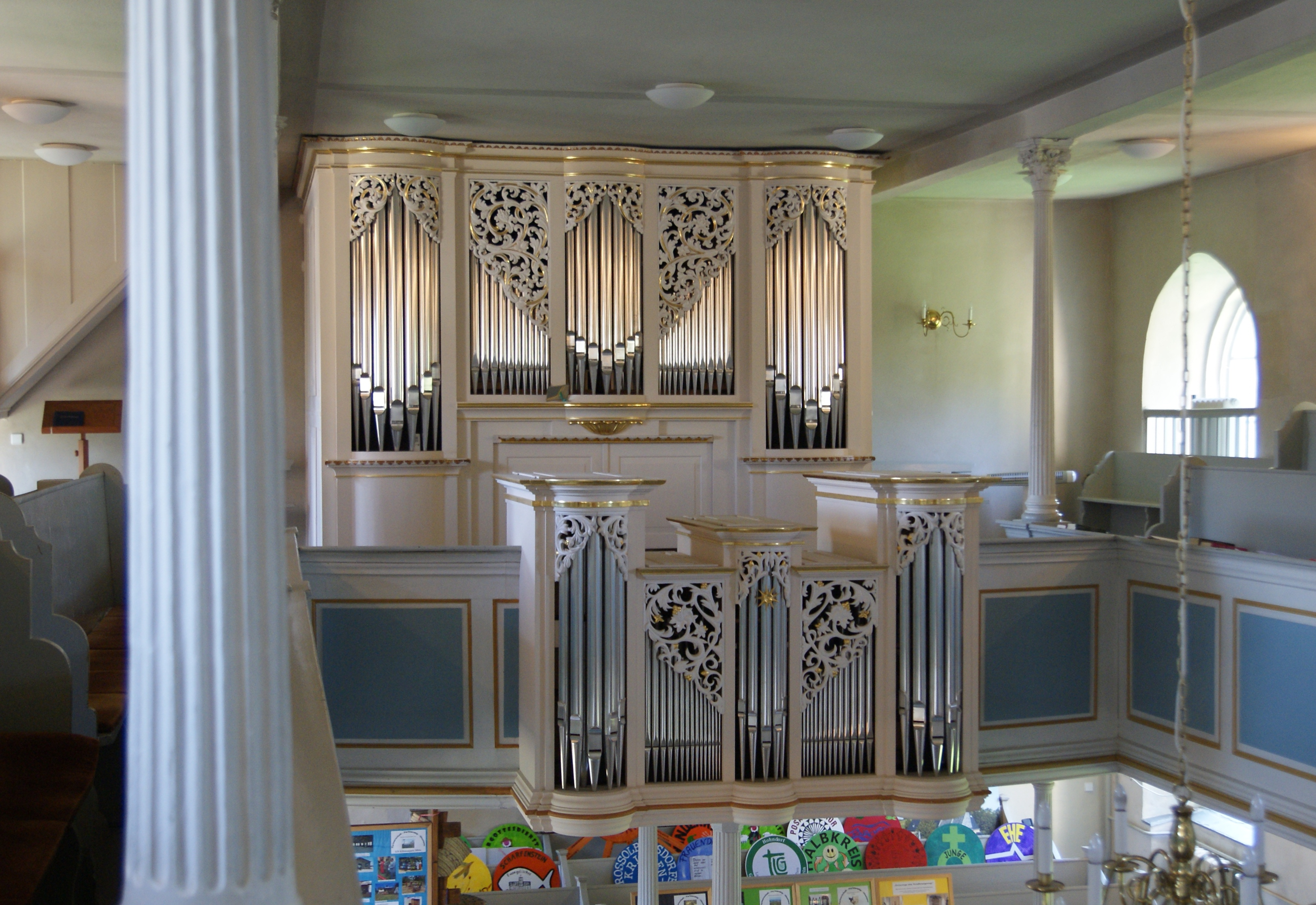 Kirche Großolbersdorf, Orgel